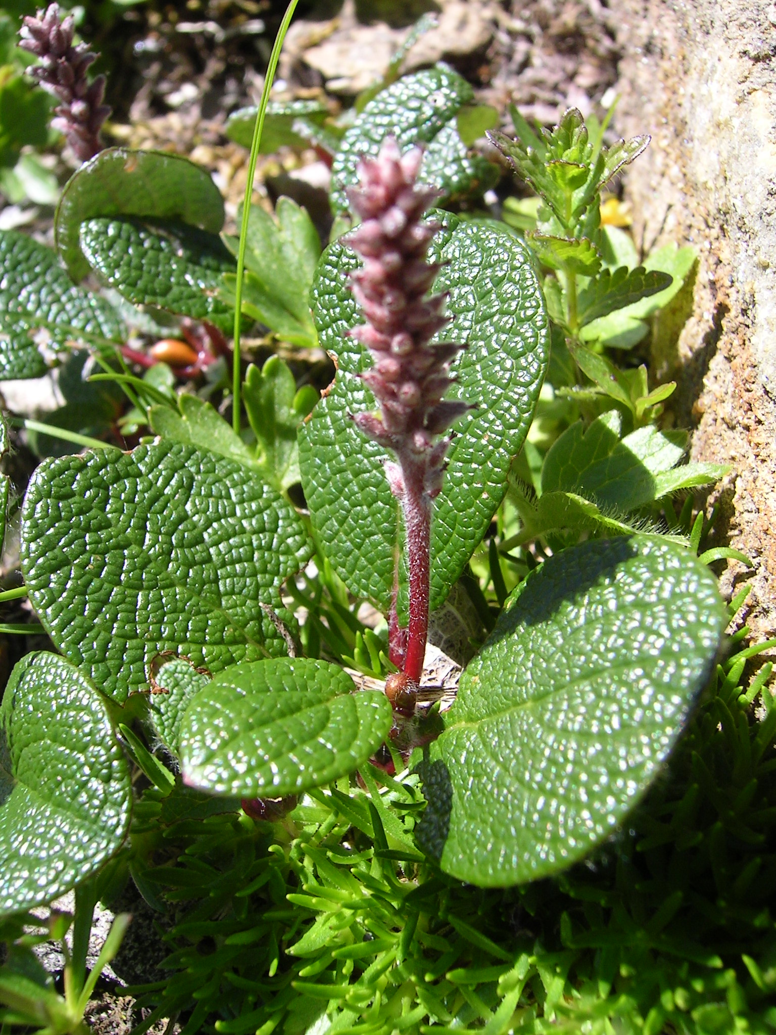 Blühende Netzweide (Salix reticulata) in der Nähe der Greina-Ebene (CH)